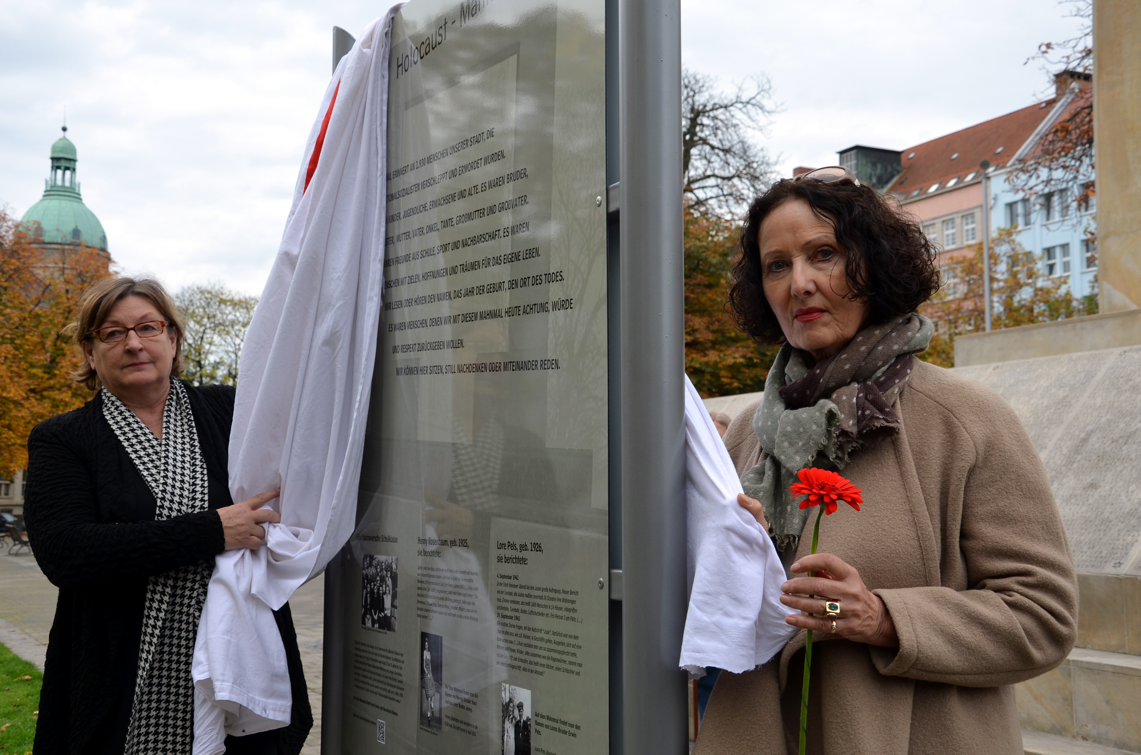 Am 25. Oktober 2013 ab 13.00 Uhr enthüllten Ingrid Wettberg, die Vorsitzende der Liberalen Jüdischen Gemeinde Hannover, gemeinsam mit Hannovers Kultur- und Schuldezernentin Marlis Drevermann, die Informationstafel zum Mahnmal für die ermordeten Juden Hannovers. Begleitet von den Klängen des Musikers Thomas Zander und vorgetragener Inhalte der Tafel durch Schüler der St. Ursula-Schule Hannover nahmen zahlreiche Gäste aus Politik, Kultur und Gesellschaft an der Veranstaltung teil, darunter die Holocaust-Überlebenden Salomon Finkelstein und Henry Korman ...